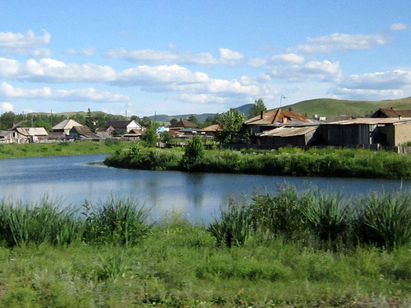 Река Туим в селе Шира (Хакасия).